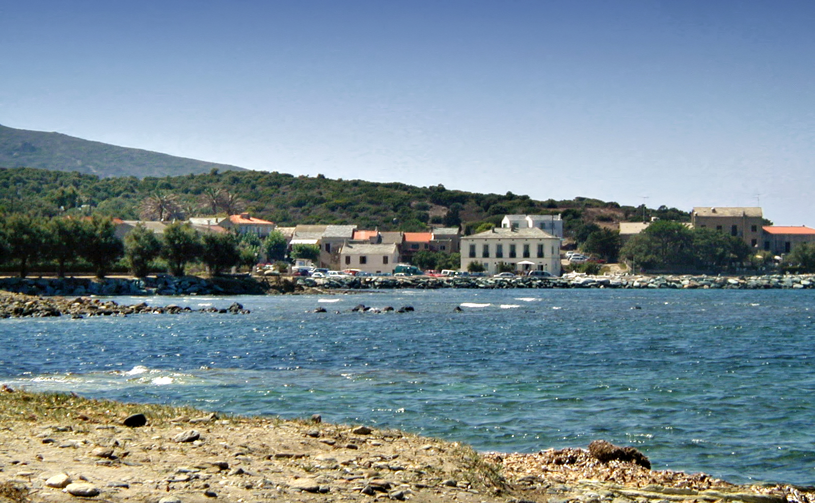 Ersa (Corsica) - Barcaggio